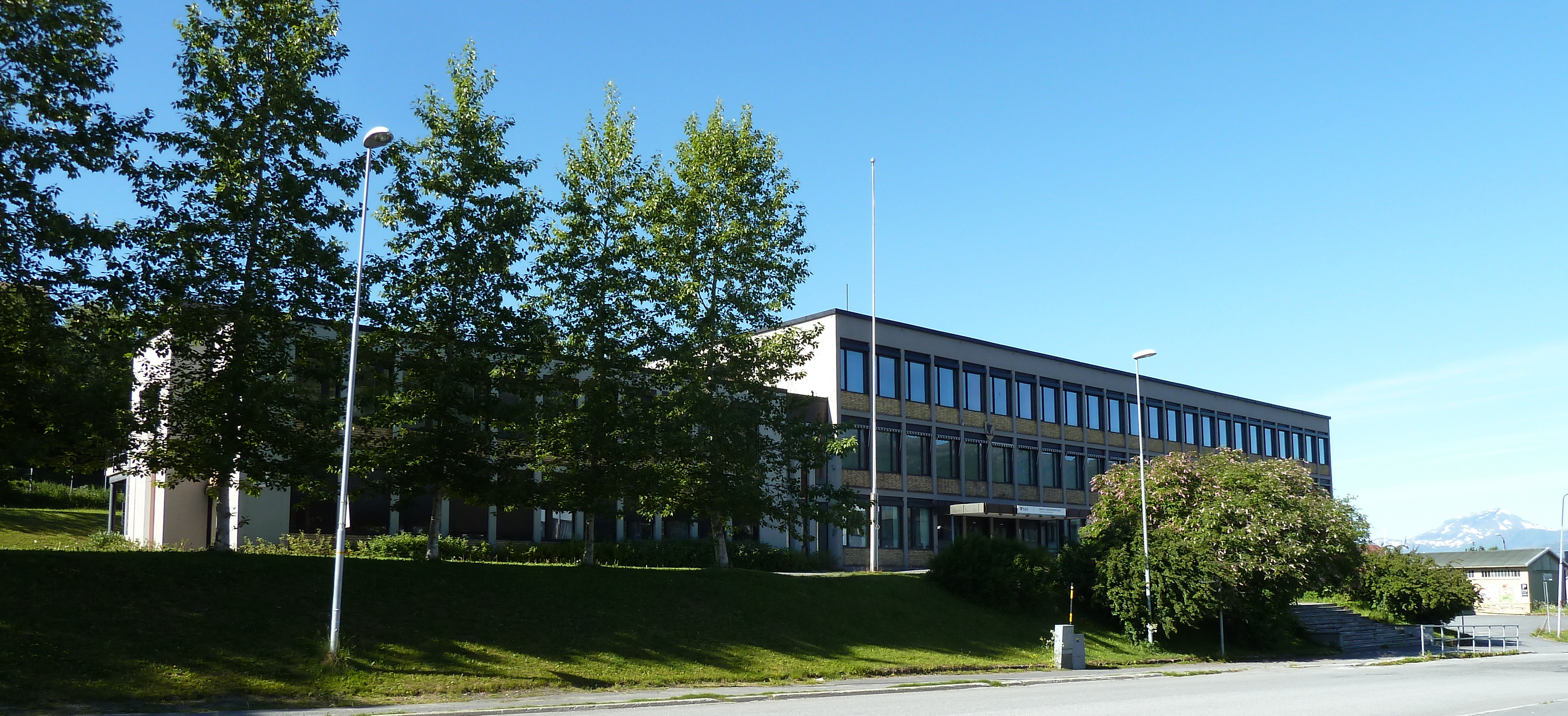 Narvik videregående skole, avdeling Frydenlund.